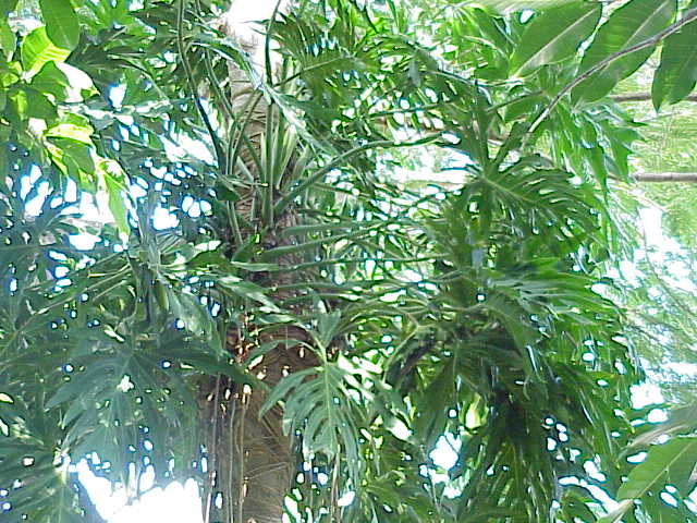 Species: Monstera deliciosa Family: Araceae Image No. 1